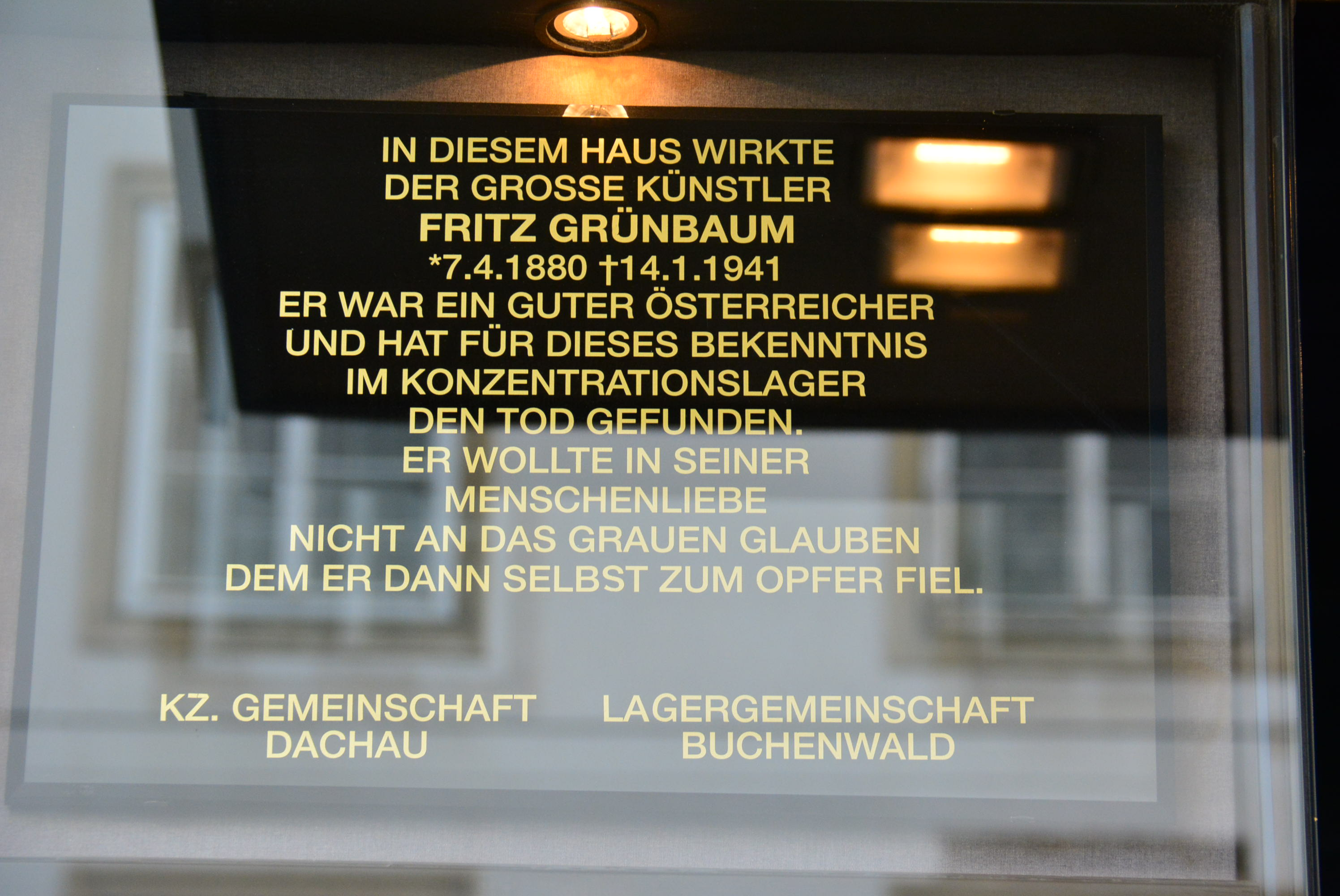 Gedenktafel für NS-Opfer (Wien, Wollzeile 36, Fritz Grünbaum)